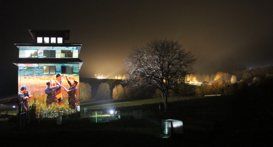 Illuminationen an der ehemaligen innerdeutschen Grenze zum Fest- und Gedenkwochenende anlässlich von 30 Jahren Friedliche Revolution und Grenzöffnung im Grenzlandmuseum Eichsfeld, 9./10. November 2019